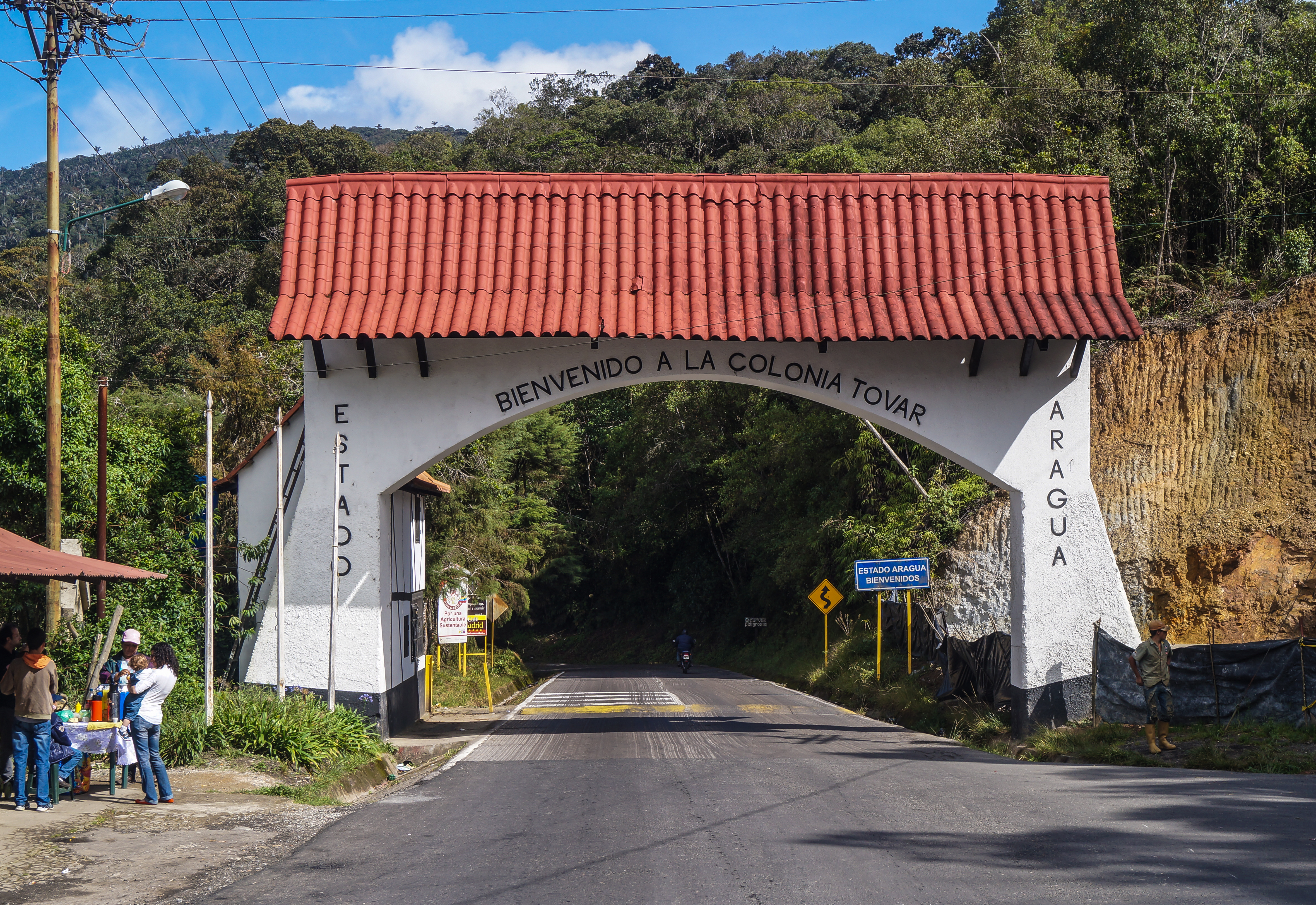 Entrada a la localidad de la Colonia Tovar. Estado Aragua. Venezuela.